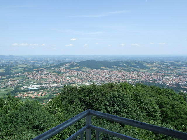 Aranđelovac aus der Bukulja aus gesehen